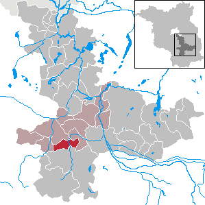 Kasel-Golzig in Brandenburg (Country) - District Dahme-Spreewald